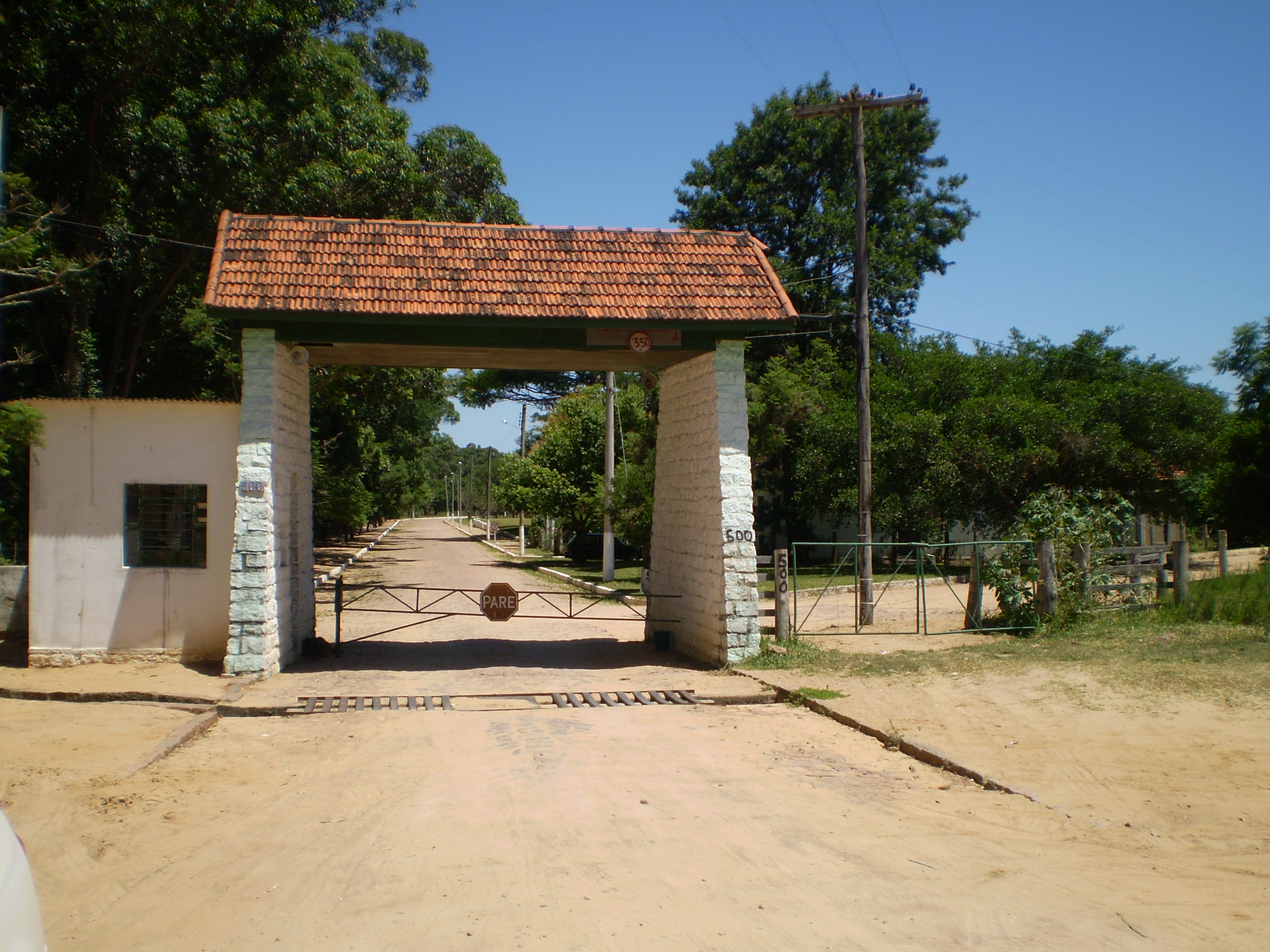 Main entrance of Itapuã Hospital, Viamão, Rio Grande do Sul, Brazil.